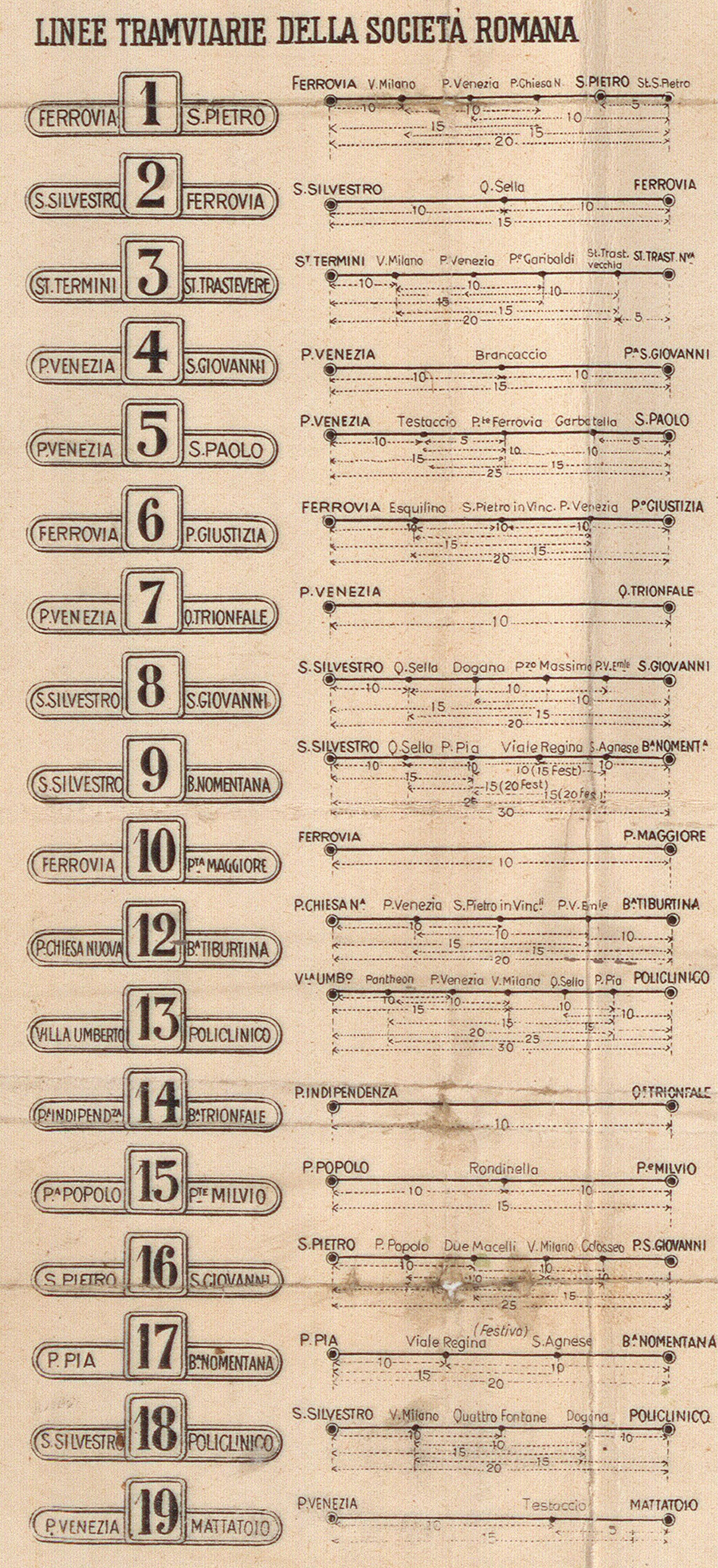 SRTO linee 1916